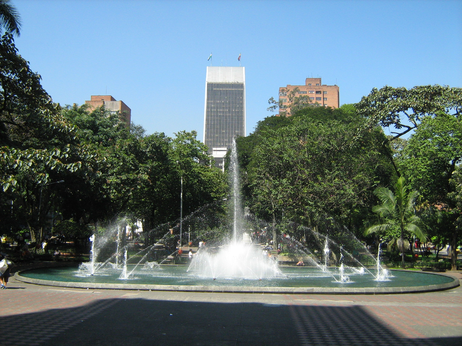 Parque de Bolívar de Medellín, foto tomada desde el atrio de la Catedral Metropolitana de Medellín. Colombia